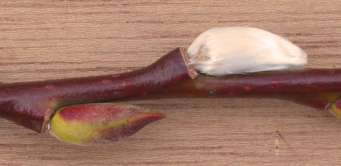 zelfgemaakte foto van een wilgentak met knoppen; eind november